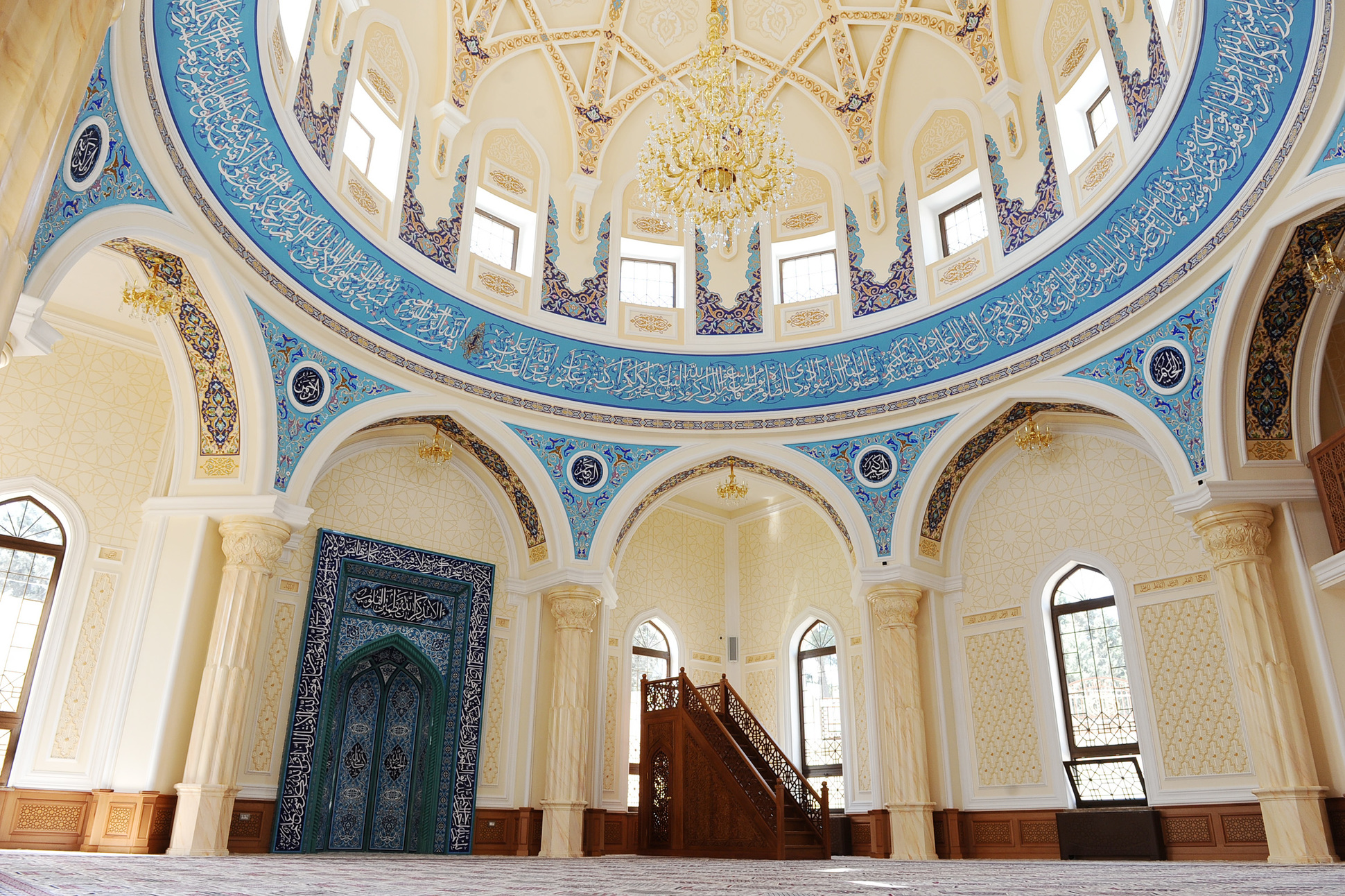 Haji Javad Mosque